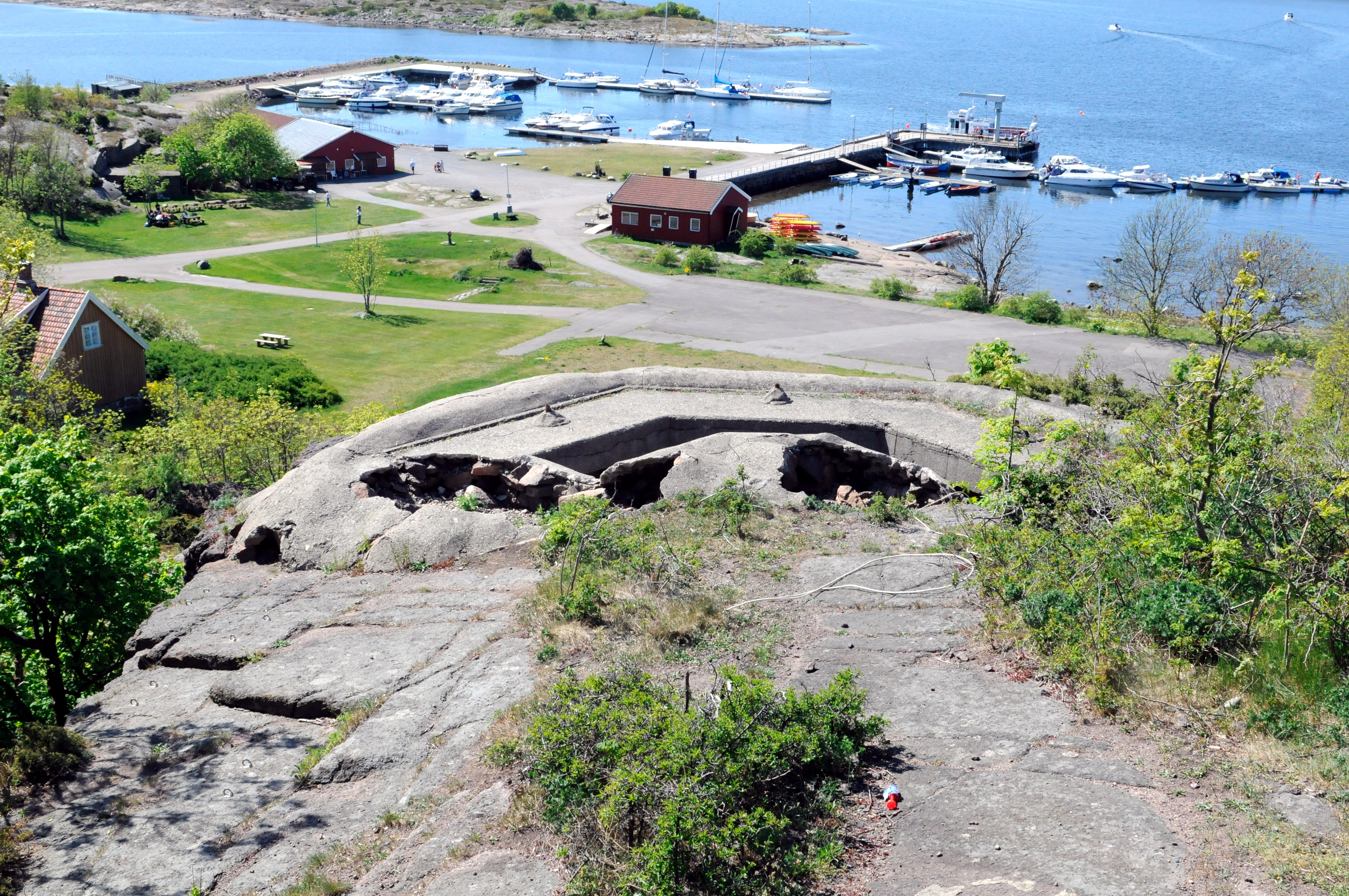 Bolærne fort - Tyskbygget MG-stilling som dekker havneområdet ved fortet